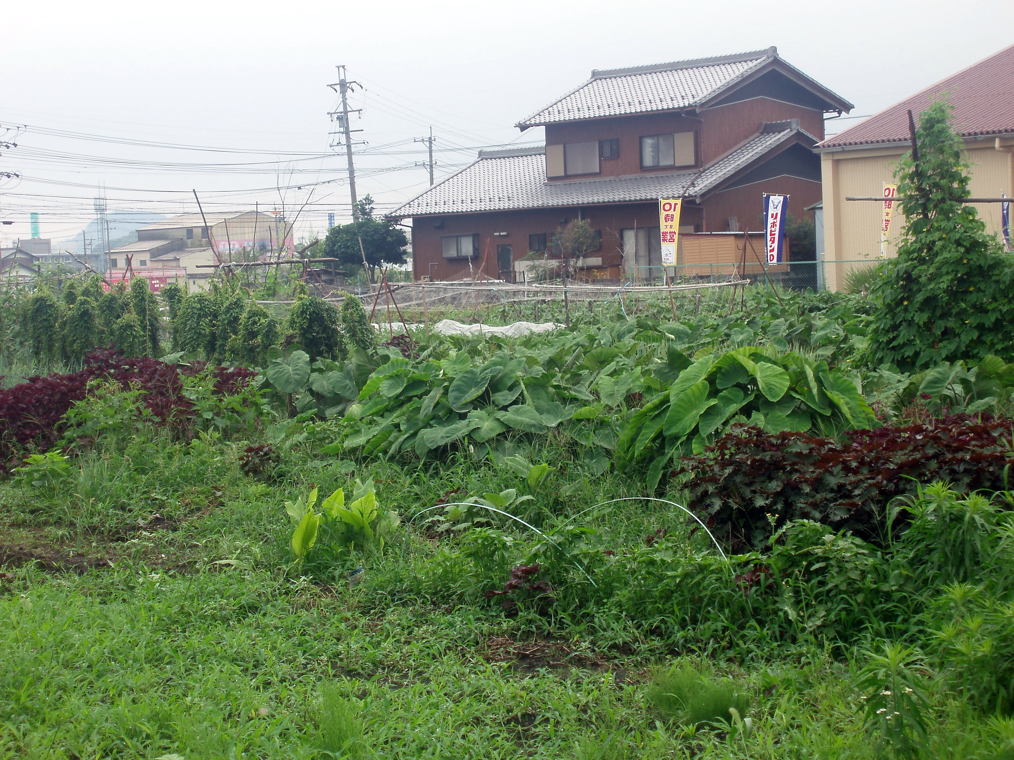 Típica escena de cultivo en Kakamigahara